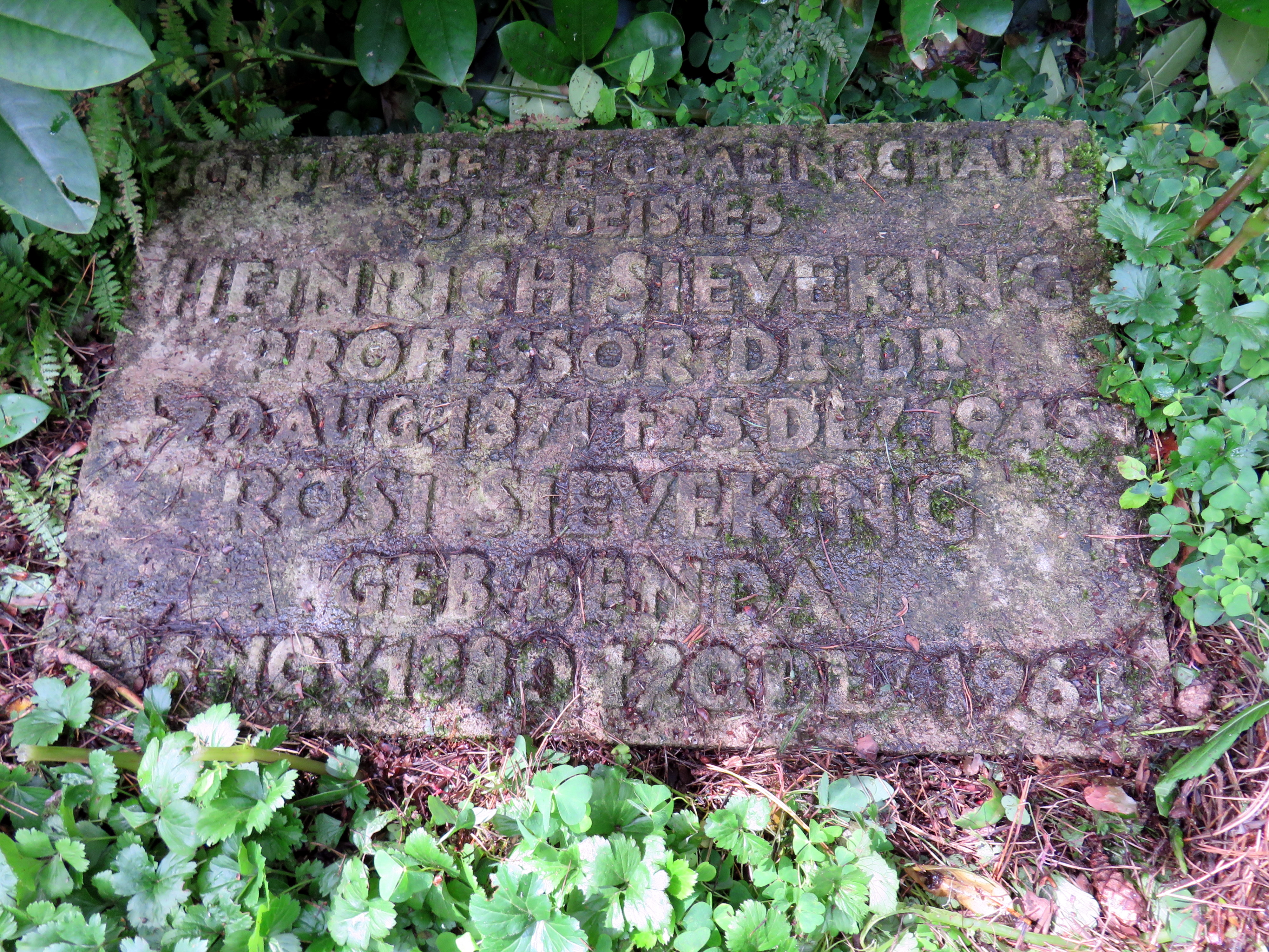 Grabkissen für den Hamburger Wirtschaftswissenschaftler Heinrich Sieveking in der Sieveking-Familien-Grabanlage auf dem Hamburger Friedhof Ohlsdorf, Planquadrat S 25 / S 26.